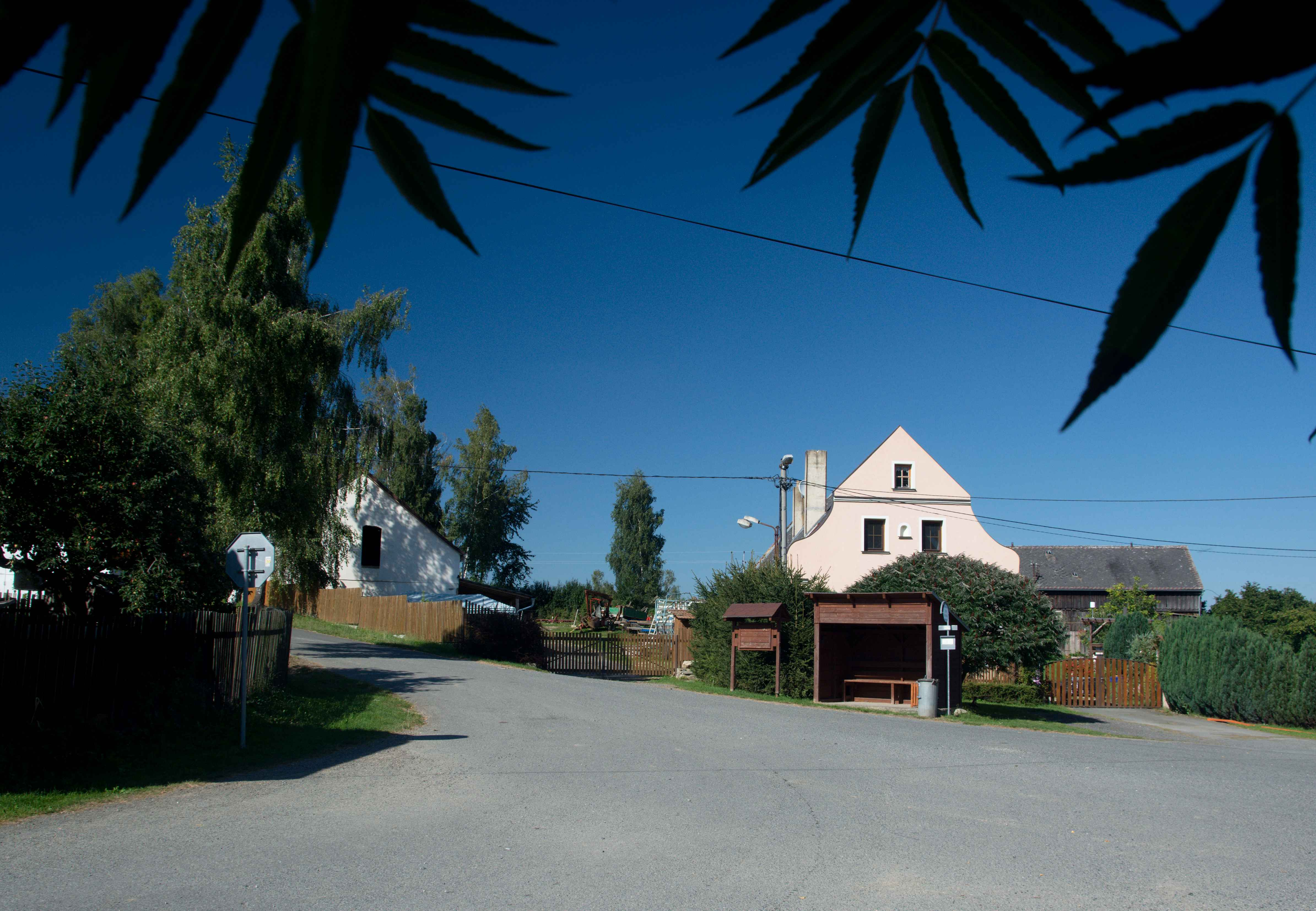 Lužná celkový pohled